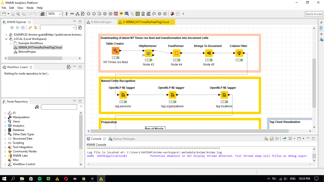 Knime 3.3.2 Ekran Görüntüsü